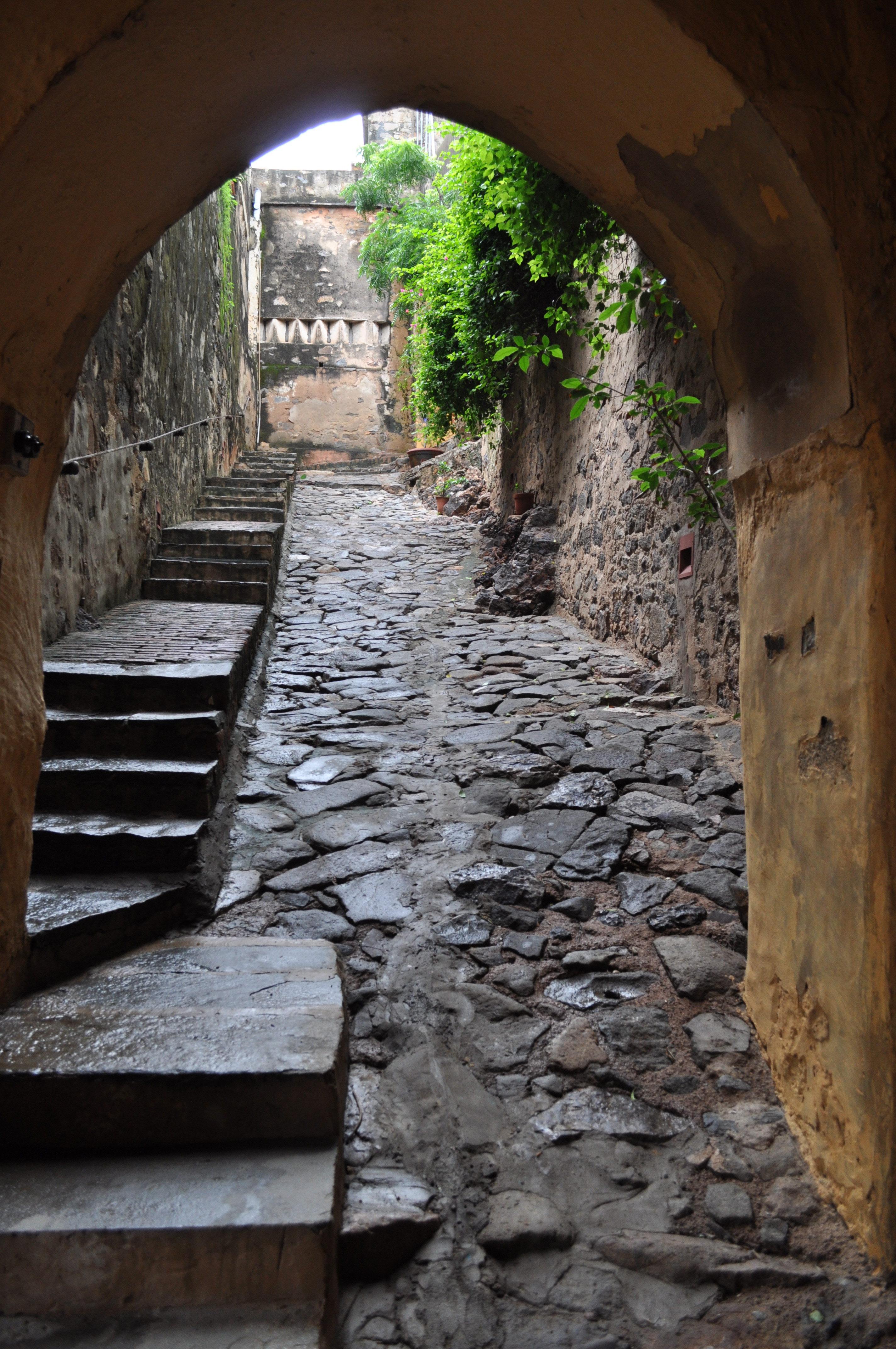 Looking up